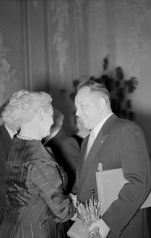 Berlin, Karl-Marx-Orden für Erich Mielke Zentralbild/Sturm 28.12.1957 Präsident Wilhelm Pieck verlieh Karl-Marx-Orden an Minister Mielke und Arbeiterveteran Josef Miller. Präsident Wilhelm Pieck hat auf Vorschlag des Präsidiums des Ministerrates den Minister für Staatssicherheit der DDR, Generalleutnant Erich Mielke, anläßlich dessen 50. Geburtstag und dem Arbeiterveteranen Josef Miller aus Anlaß dessen 50jährigen Parteijubiläums den Karl-Marx-Orden verliehen. Orden und Urkunde zu der höchsten staatlichen Auszeichnung der Republik nahmen Minister Mielke und Josef Miller am 28.12.1957 im Amtssitz des Präsidenten, Schloß Niederschönhausen in Berlin aus der Hand des Chefs der Präsidialkanzlei, Staatssekretär Max Opitz, entgegen. U.B.z: Die Tochter des Staatspräsidenten, Frau Elli Winter, beglückwünscht Erich Mielke zur Auszeichnung. Abgebildete Personen: Mielke, Erich: Minister für Staatssicherheit, Armeegeneral, Politbüro des Zentralkomitees (ZK) der SED, DDR (GND 118977490) Winter, Elli: Wissenschaftliche Mitarbeiterin im Institut für Marxismus-Leninismus (IML) beim Zentralkomitee (ZK) der SED, Tochter von Präsident Pieck, DDR